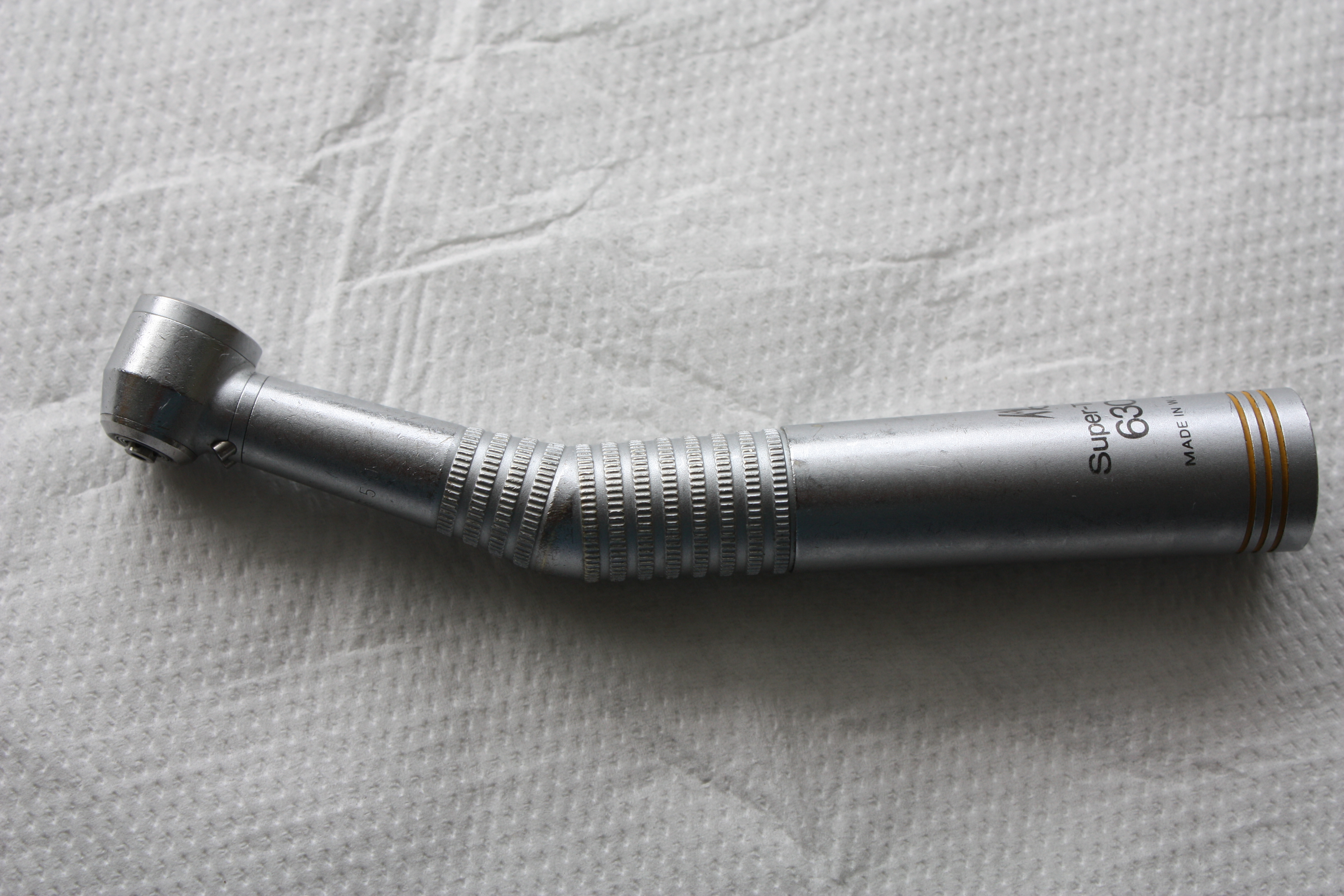 Turbine Zahnarzt